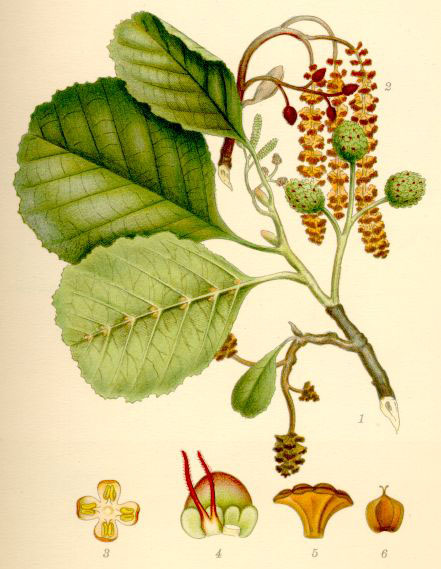 Alnus glutinosa